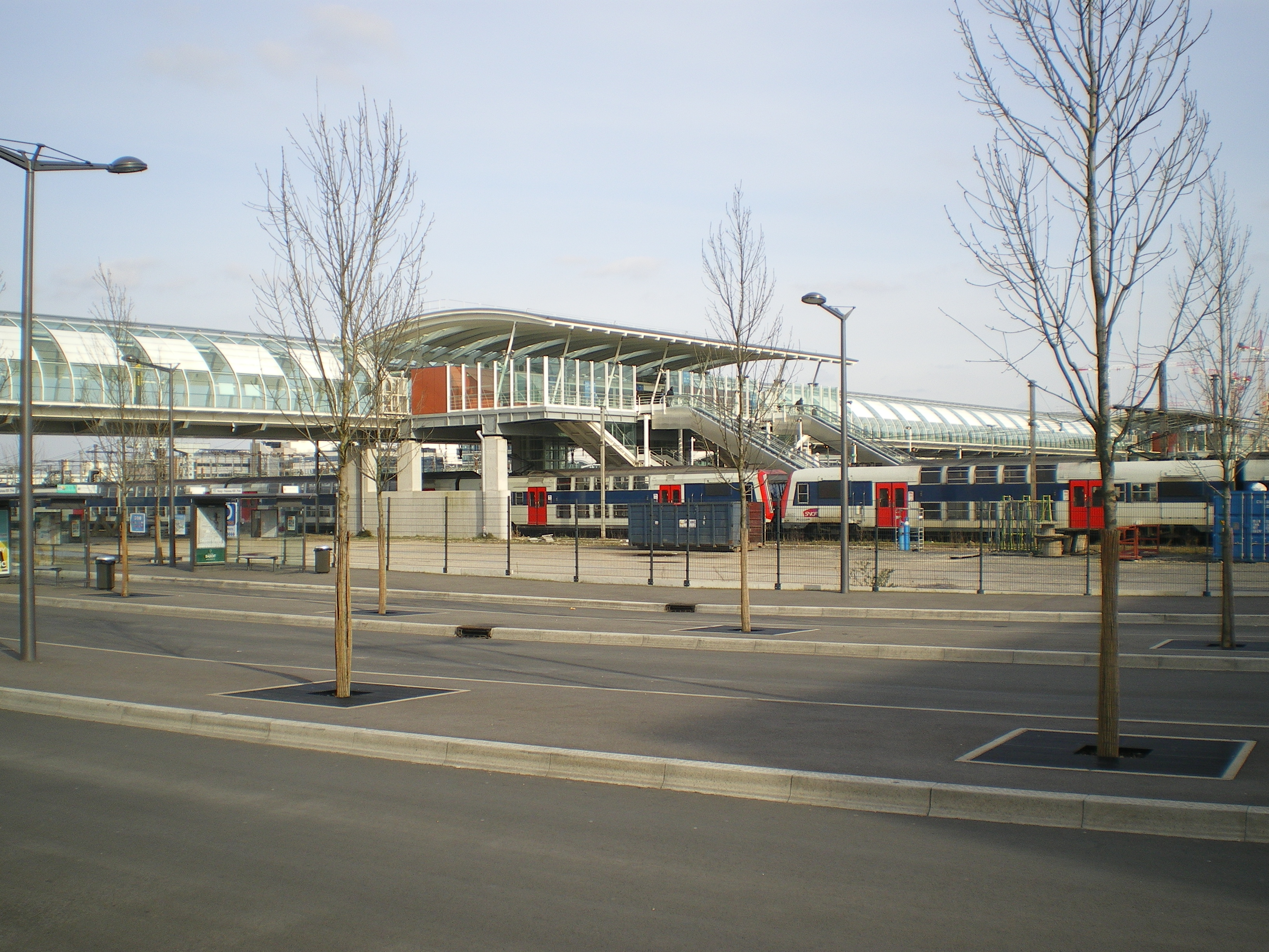 Gare de massy-palaiseau, gare routiere Ouest